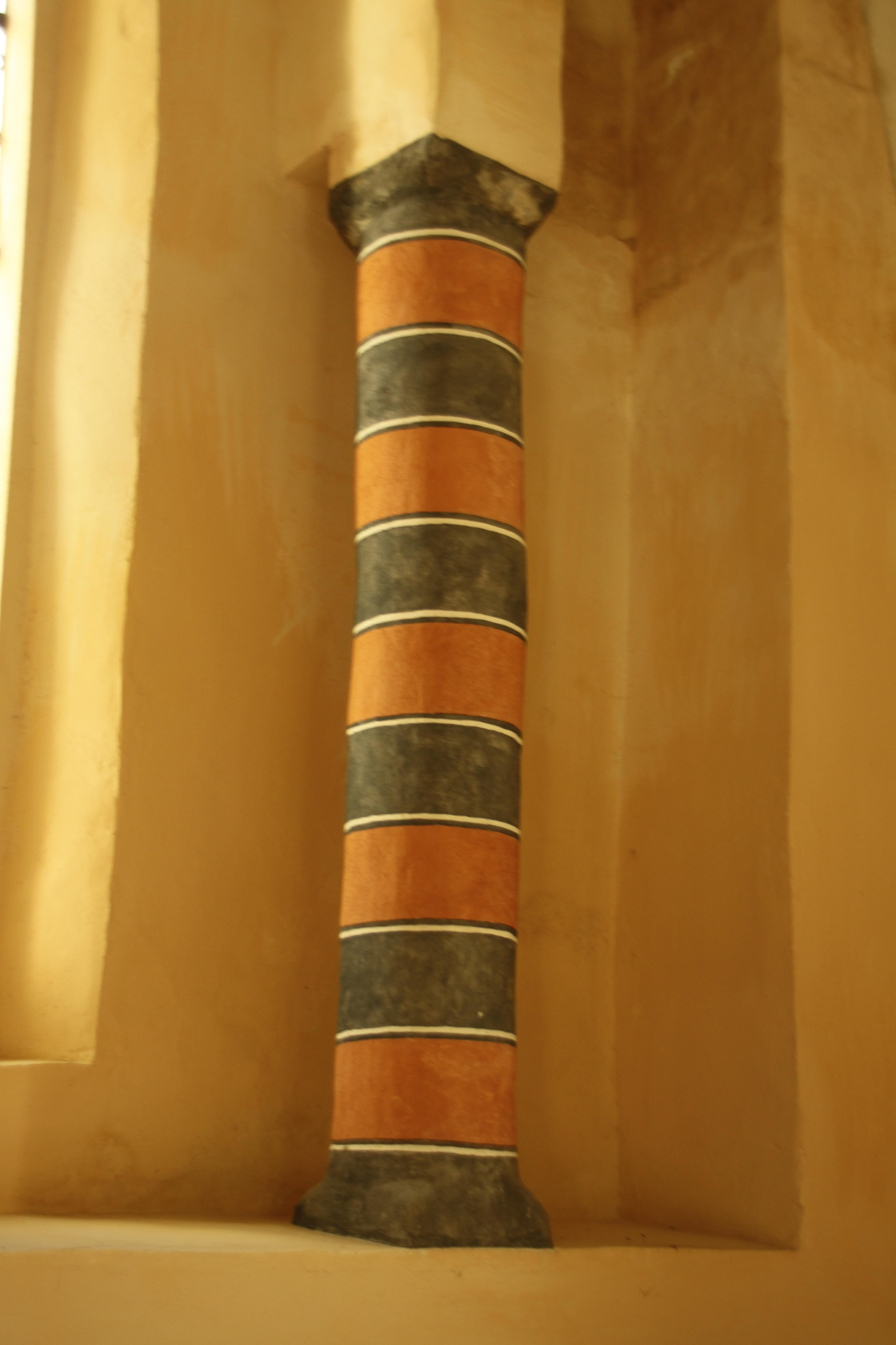 Mittelalterliche Malerei in der Rysumer Kirche